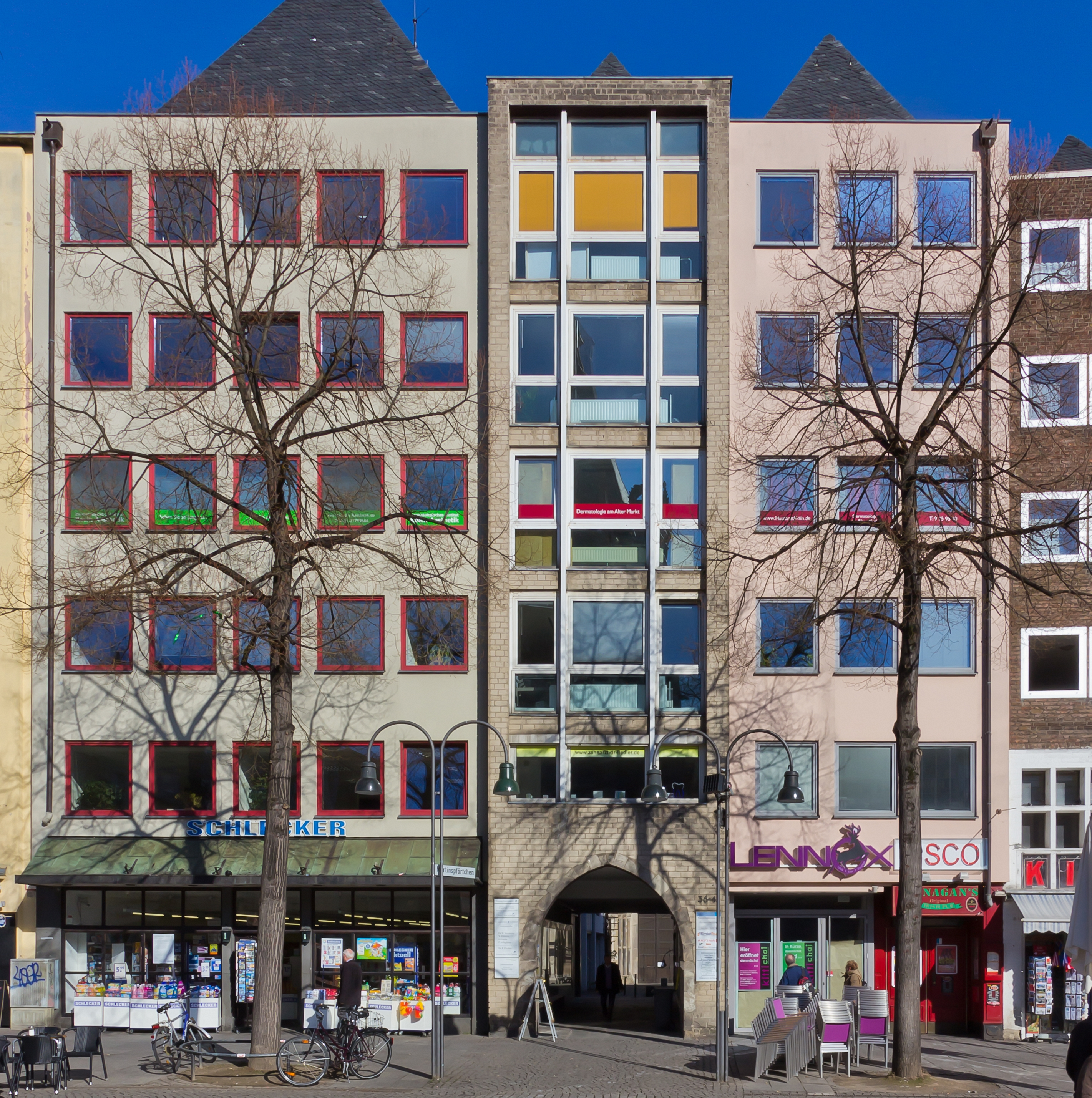 Denkmalgeschütztes Büro- und Geschäftshaus Alter Markt